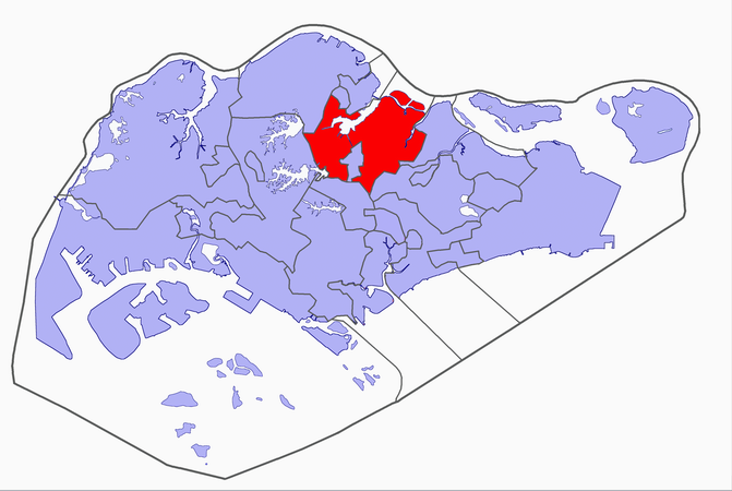 Singapore electoral map